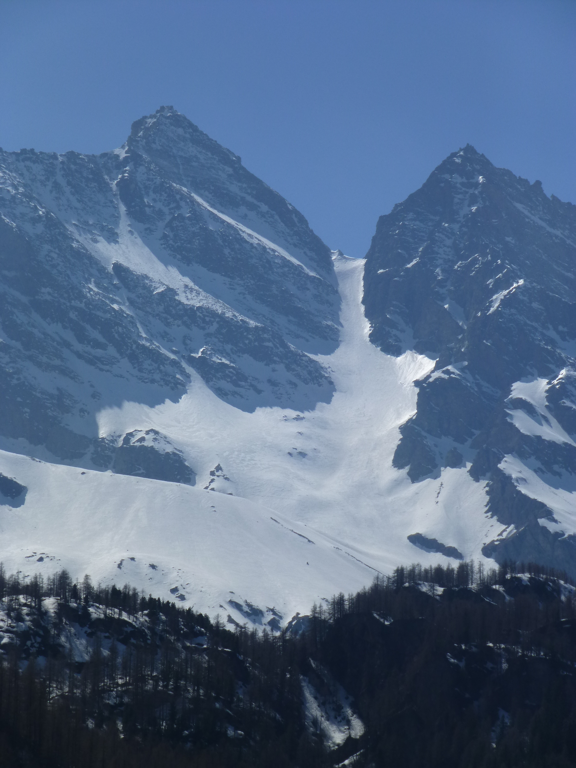 Col Perdù visto dalla diga di Ceresole Reale